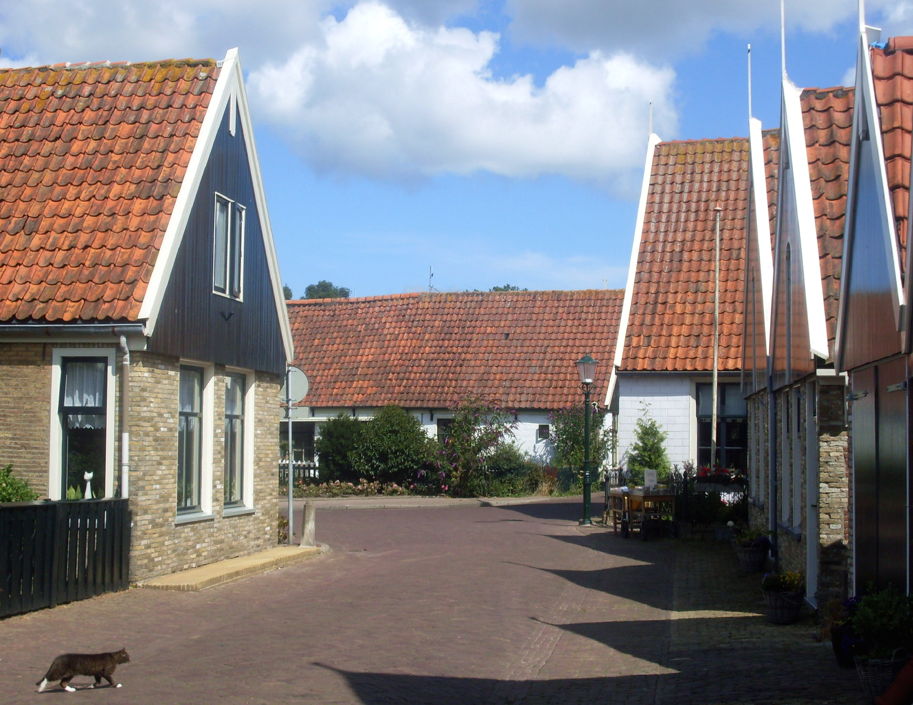 Straatje in Oosterend (Texel)